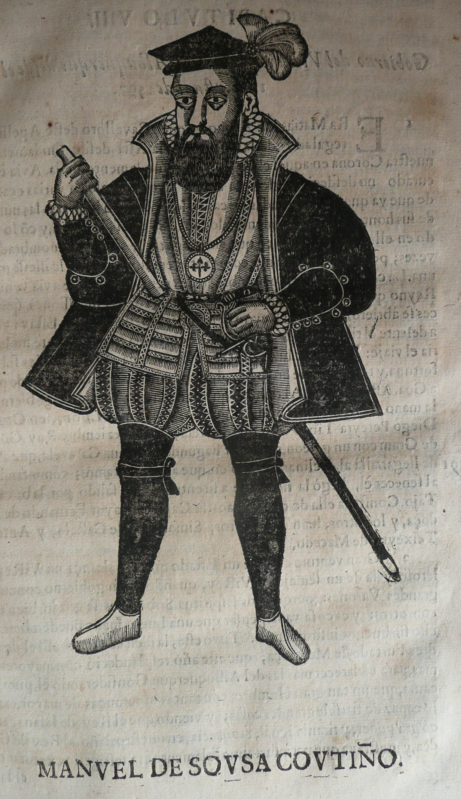 Portrait du Gouverneur de l'Inde portugaise Manuel de Sousa Coutinho